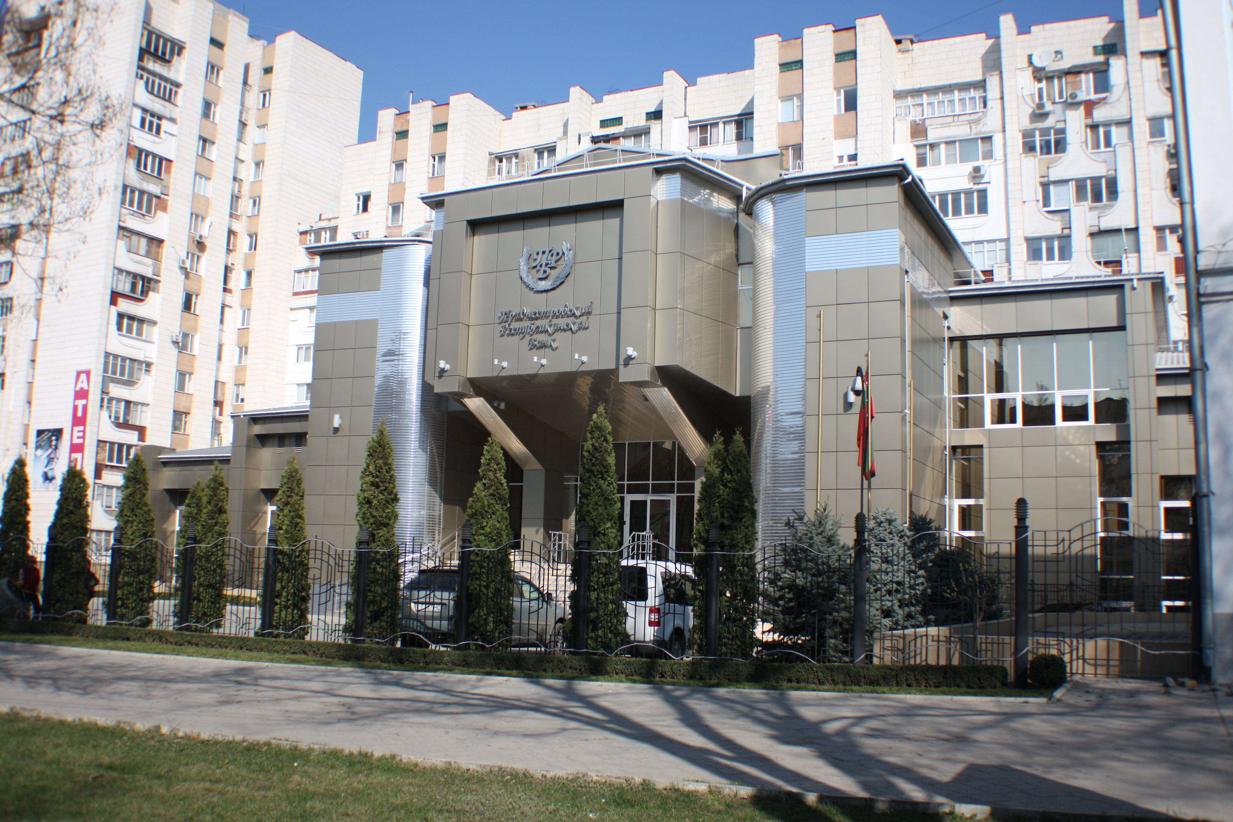 "Banque Nationale de Pridnestrovie Moldova Republik" (PMR) "Banque Nationale d la république Moldave du Dniestr" (RMP) situé à Tiraspol seconde ville de la Moldavie ou "capital de la RMP"